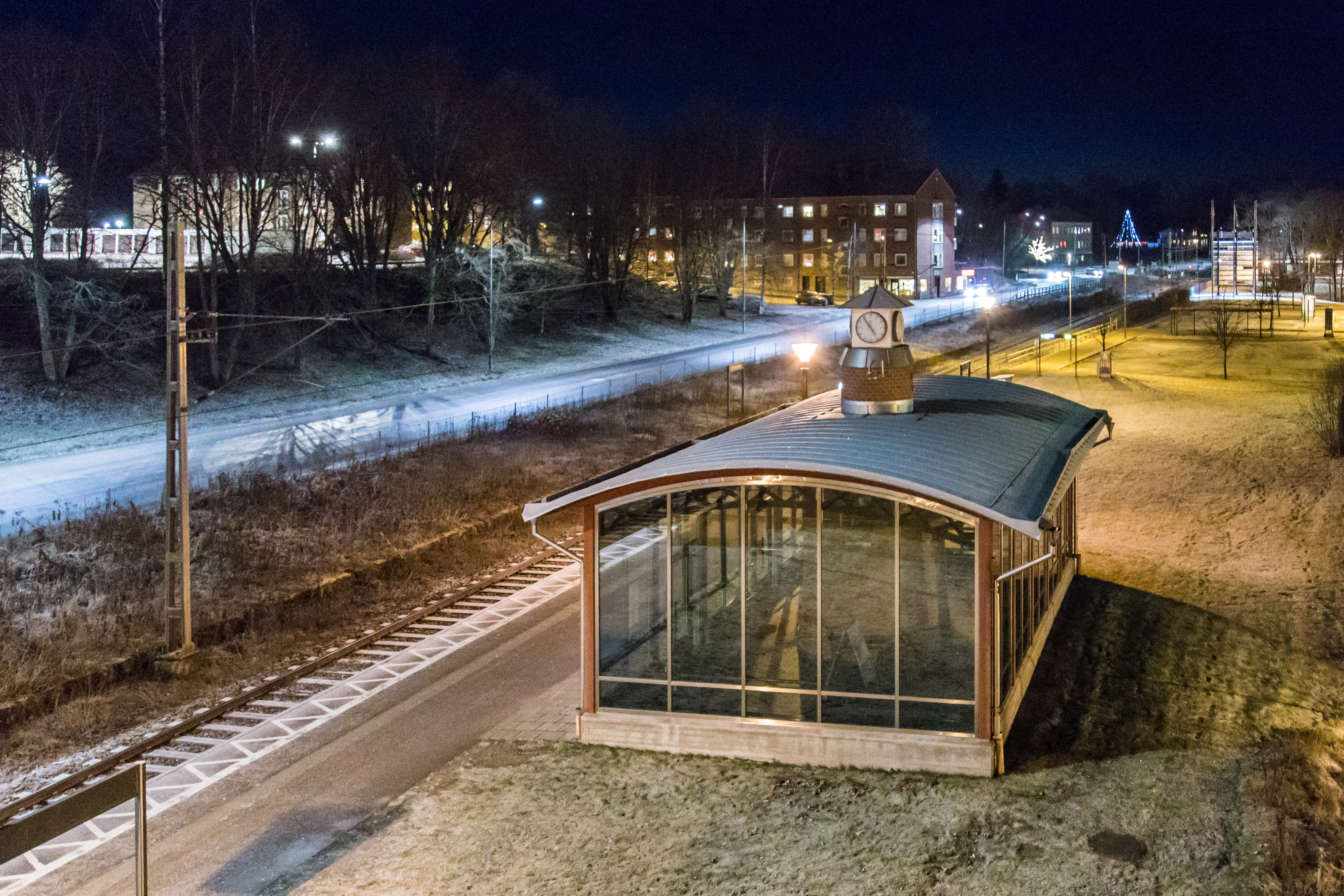 Avesta centrum längs Dalabanan, bild tagen från järnvägsbron.